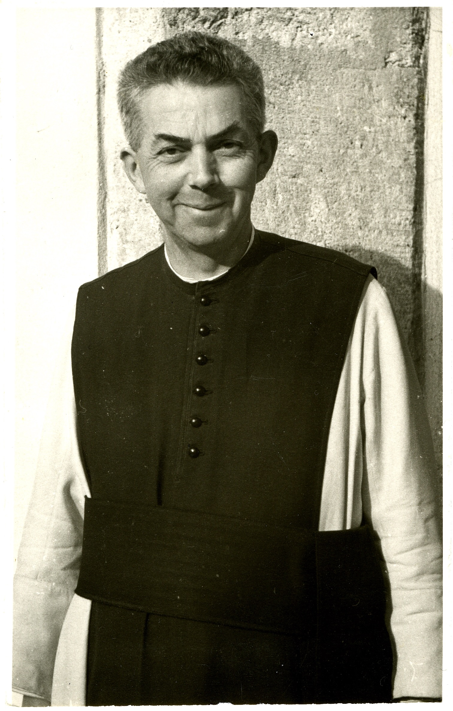 Watzl (1902-1986) war ein österreichischer römisch-katholischer Theologe, Stiftsarchivar des Stift Heiligenkreuz und Kirchengeschichtler. Siehe Wiki.de.